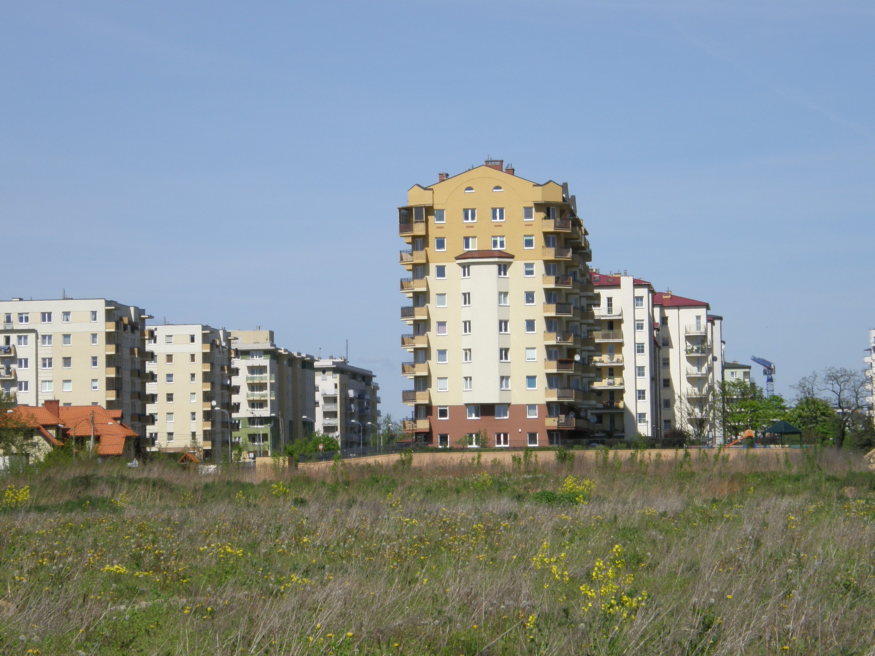 os. Skorosze